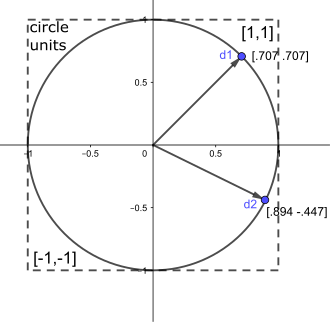 Иллюстрирация дух 2D векторов направления, d1 и d2.